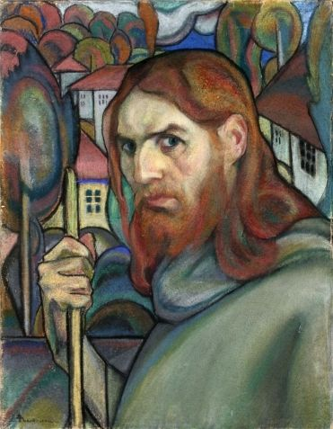 Ion Theodorescu-Sion - Autoportret, pastel pe carton, deţinător Muzeul de Artă din Tulcea.